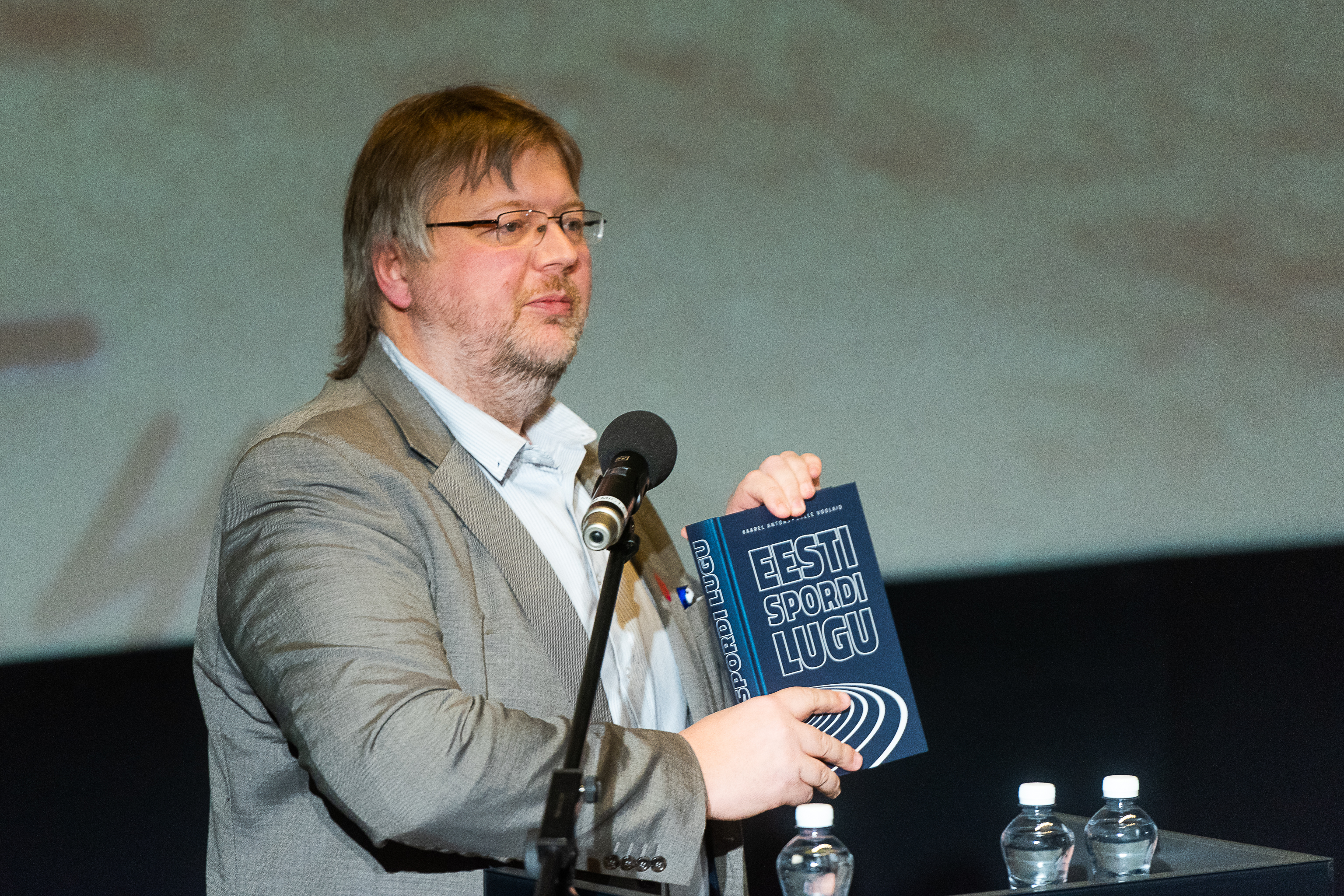 Kalle Voolaid, Eesti muuseumide aastakonverents